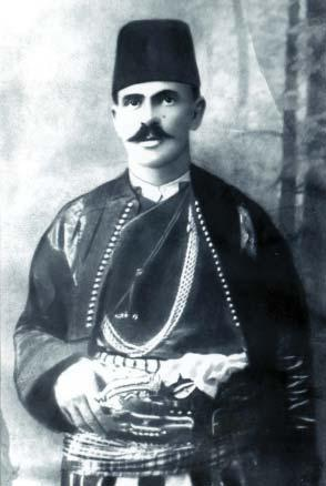 Исмаил Стразимири